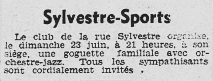 Annonce d'une goguette organisée par Sylvestre-Sport, le club de la rue Sylvestre, à Marseille, avec orchestre de jazz, parue le 22 juin 1935, veille de la goguette, dans Rouge-Midi, page 6, 5ème colonne.